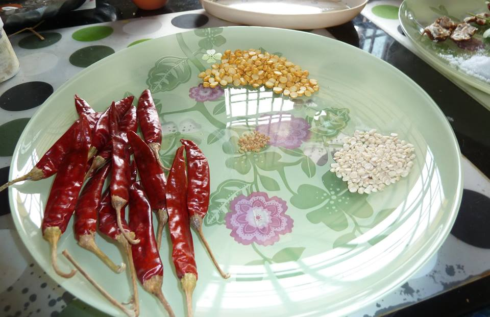 పోపు కూరకు కావల్సిన సామాను